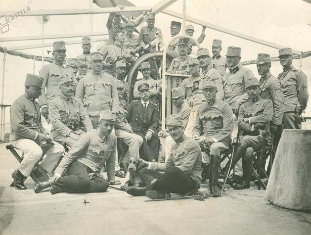 Vojaki 87. pešpolka na ladji na poti iz Pulja v Skader.